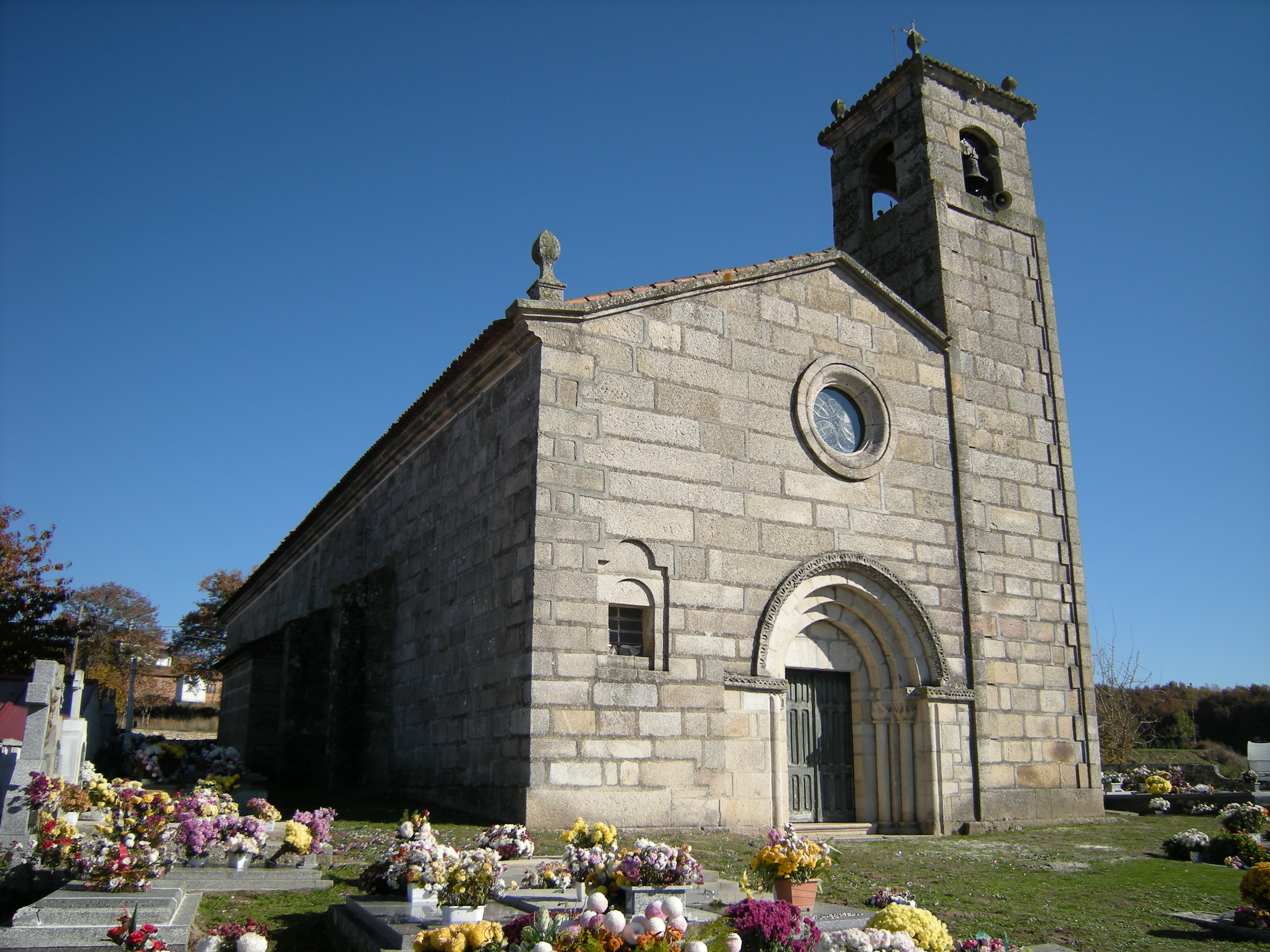 Igrexa de Santa María de Parada de Outeiro, Parada de Outeiro, Vilar de Santos